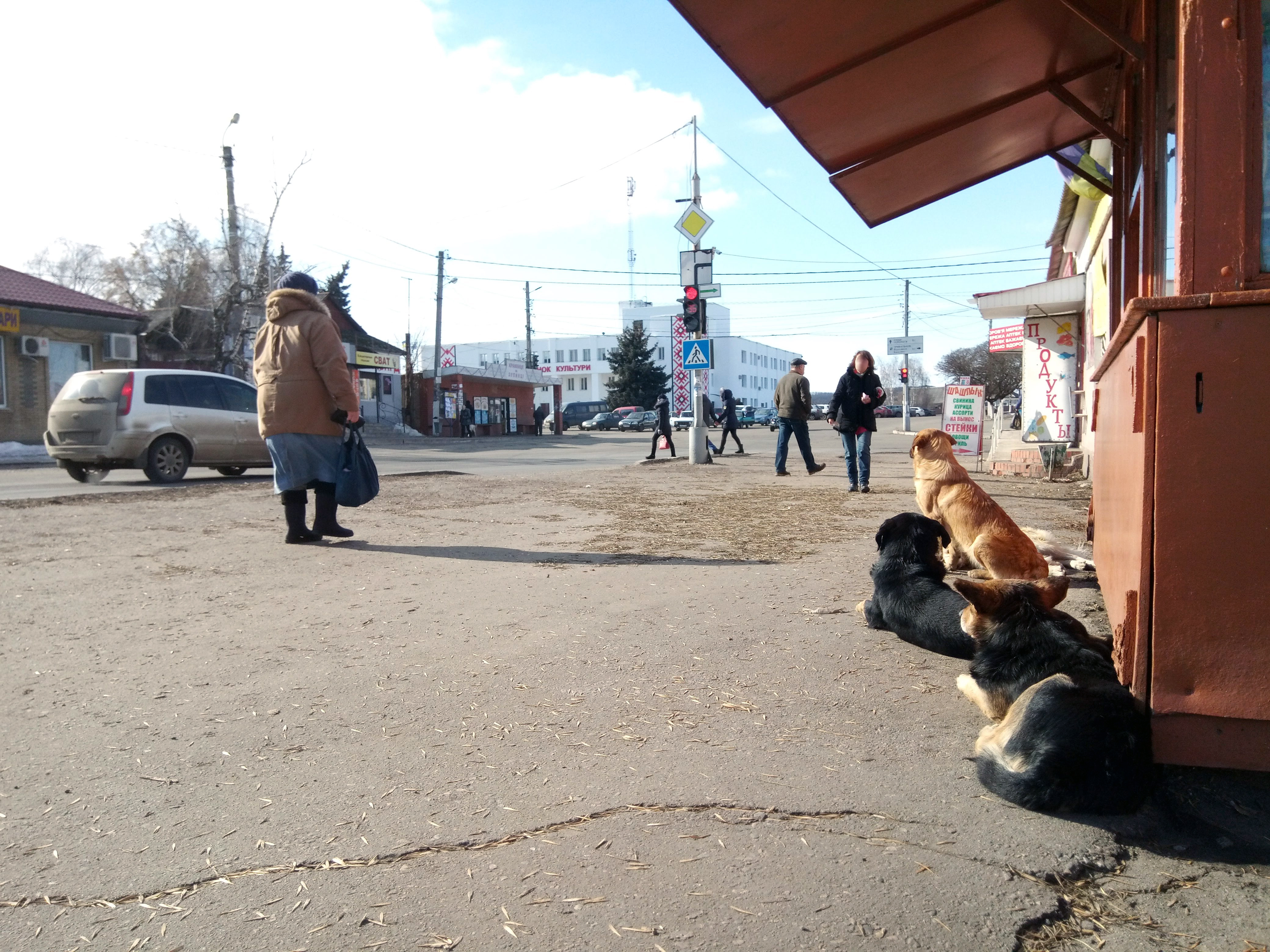 На передньому плані фото зображено групу бродячих псів. На задньому плані - будинок культури у місті Дергачі